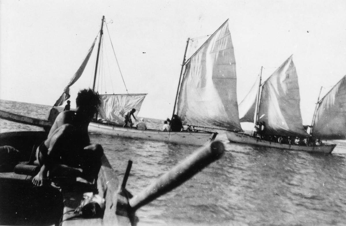 אימוני הים של הפלמ"ח בקיסריה 8 - המחלקה הגרמנית - בקורס ימי קצר בקיסריה - שדות ים